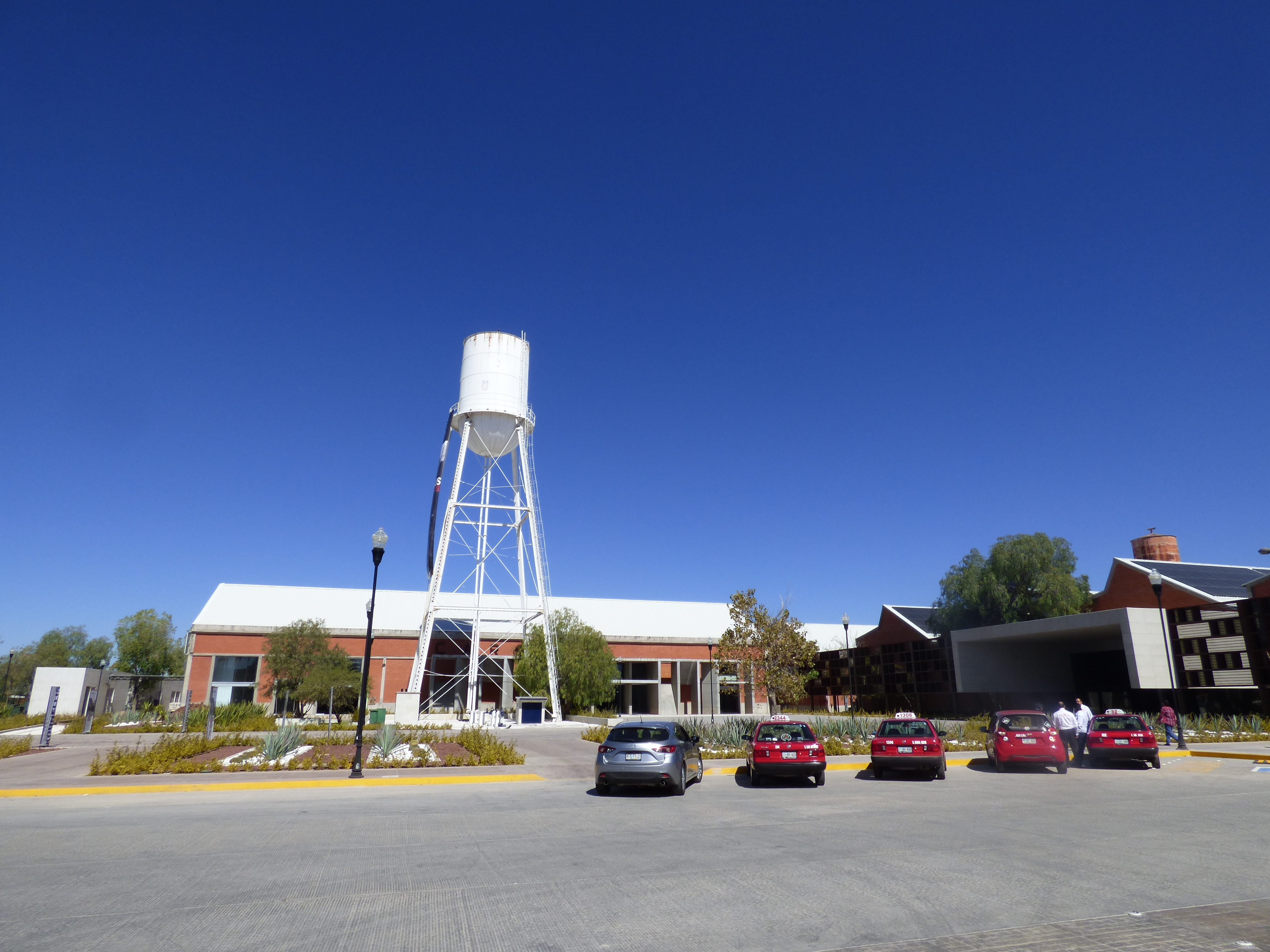 Vista del Museo Espacio del MECA, Aguascalientes